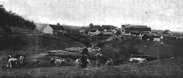 Vysočany (okres Znojmo)